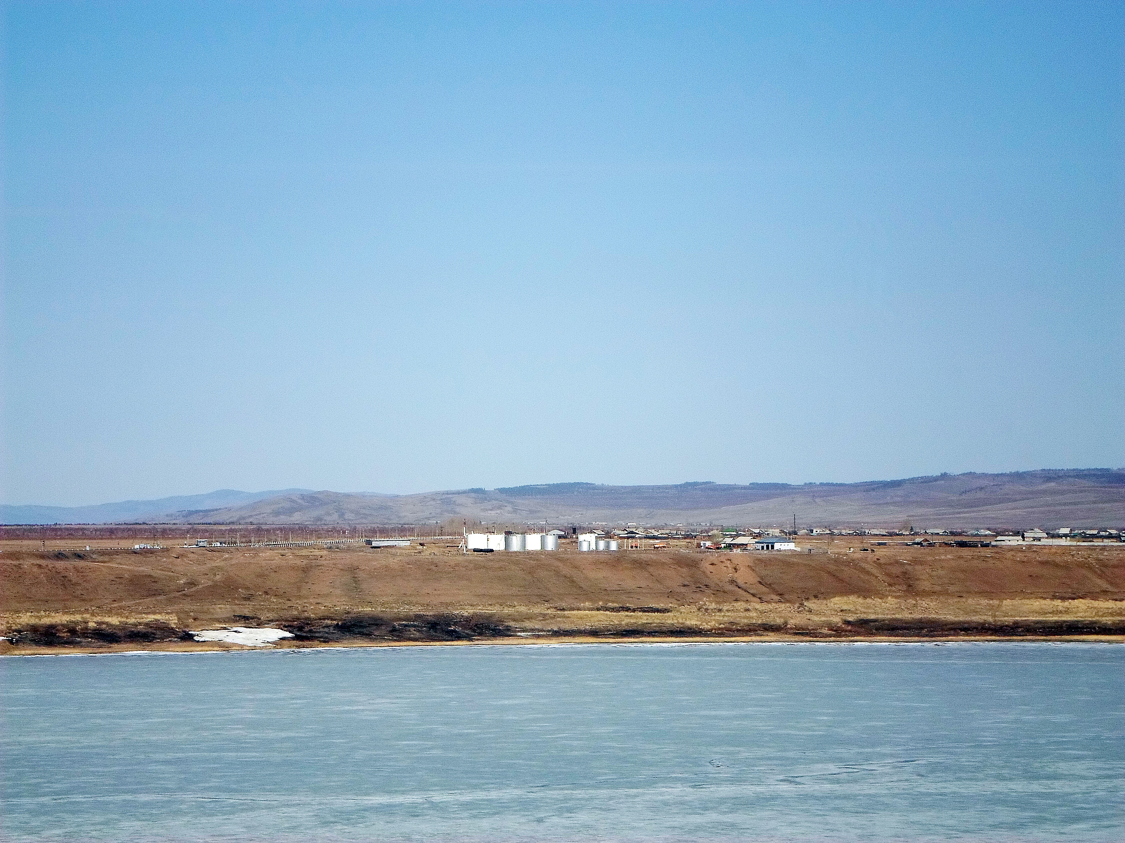 Вид с Загустайского мыса на станцию Сульфат. Селенгинский район Бурятии. Апрель 2015 года.